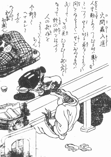 Himamushi-nyūdō (火間虫入道) from the Konjaku Hyakki Shūi (今昔百鬼拾遺)